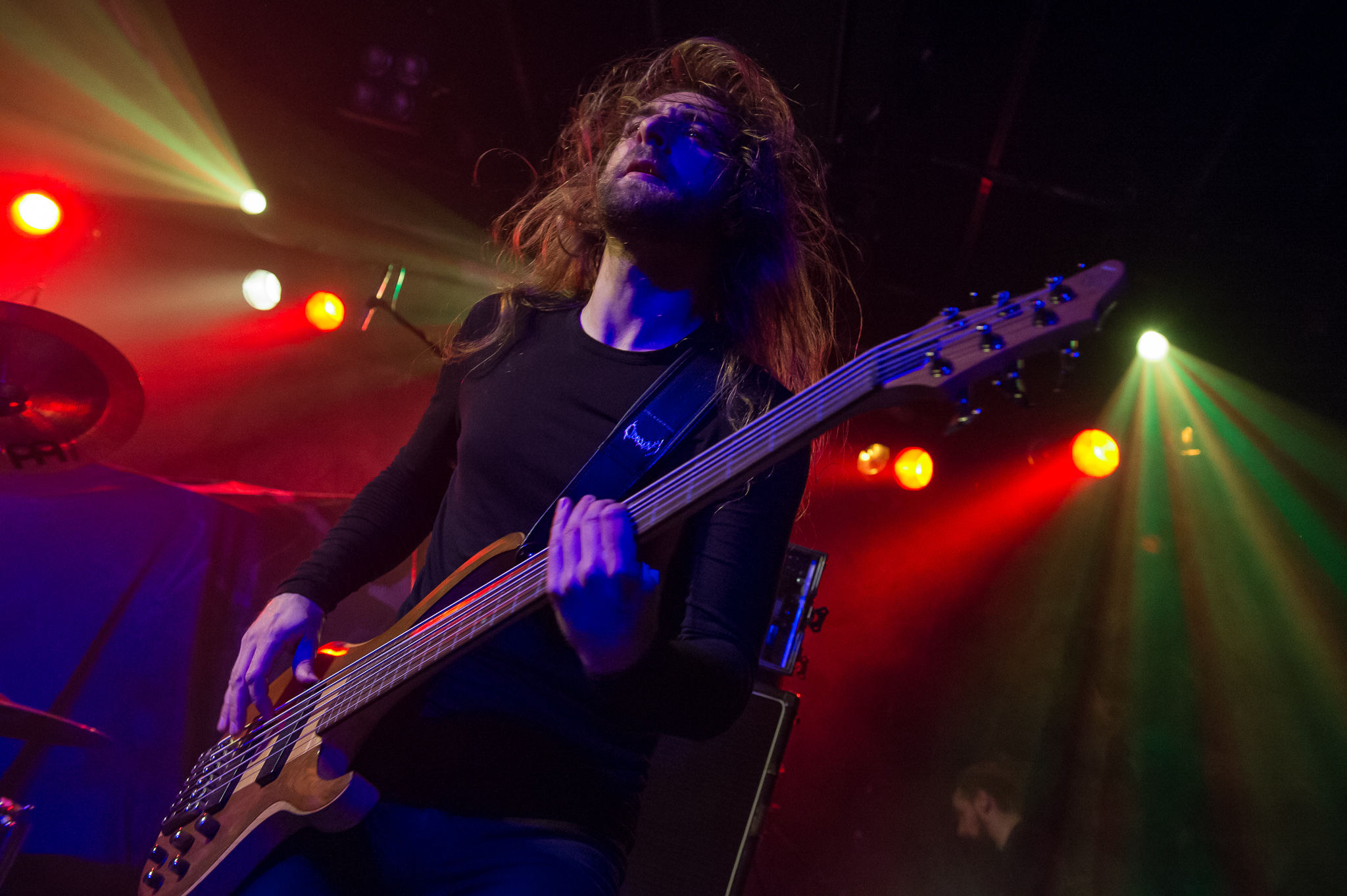 Concertbüro Franken,Der Hirsch,Konzert,Linus Klausenitzer,Livekonzert,Livemusik,Obscura